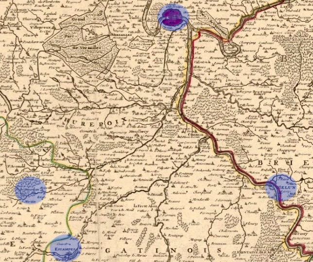 Hurepoix carte et limites, extrait de Nicolas de Fer (1647-1720) : "Les Environs de Paris, où se trouve l'Ile-de-France, le Vexin français et normand, la Champagne normande, l'Hurepoix..." (début XVIIIe siècle).